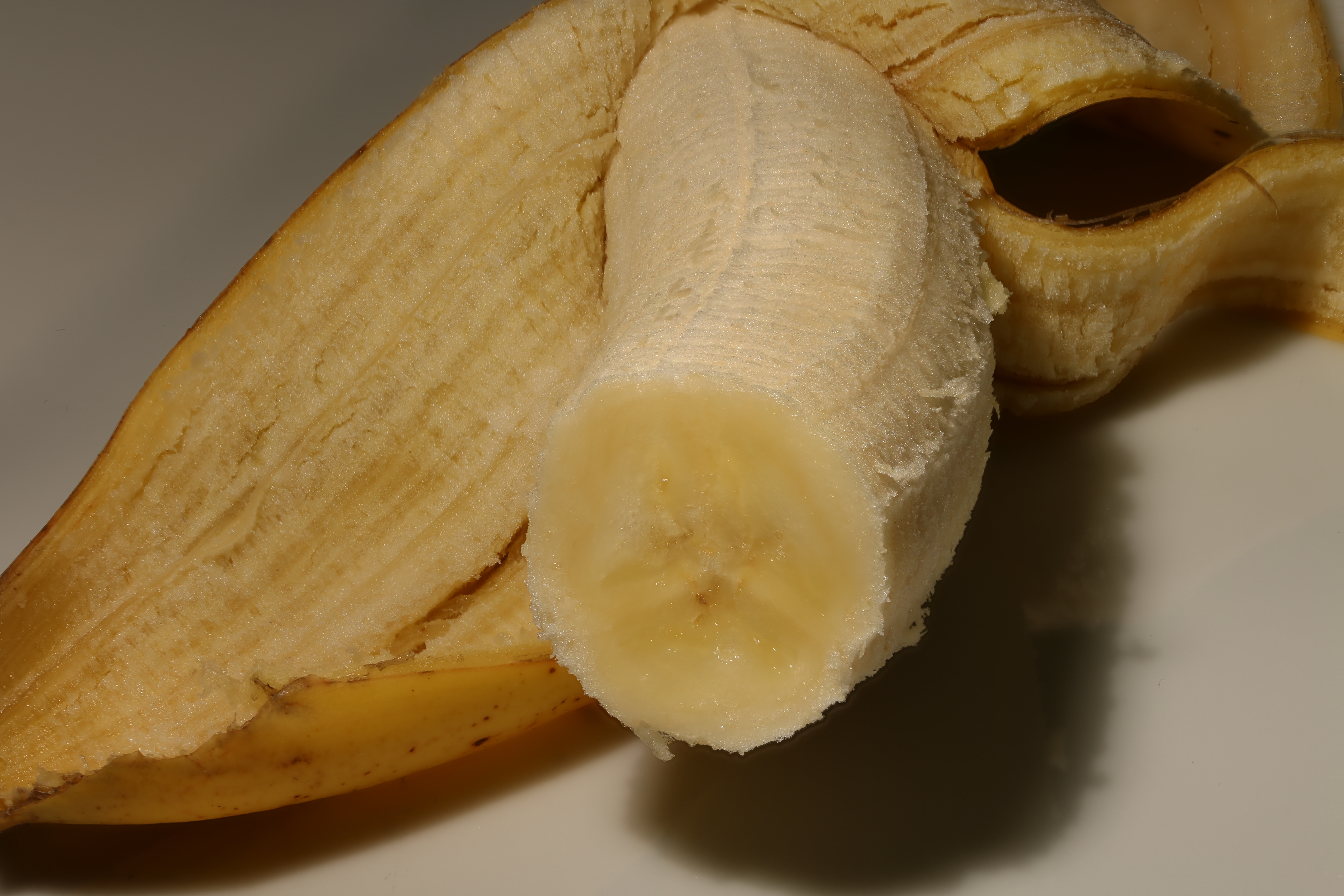 aufgeschnittene Banane mit Schale